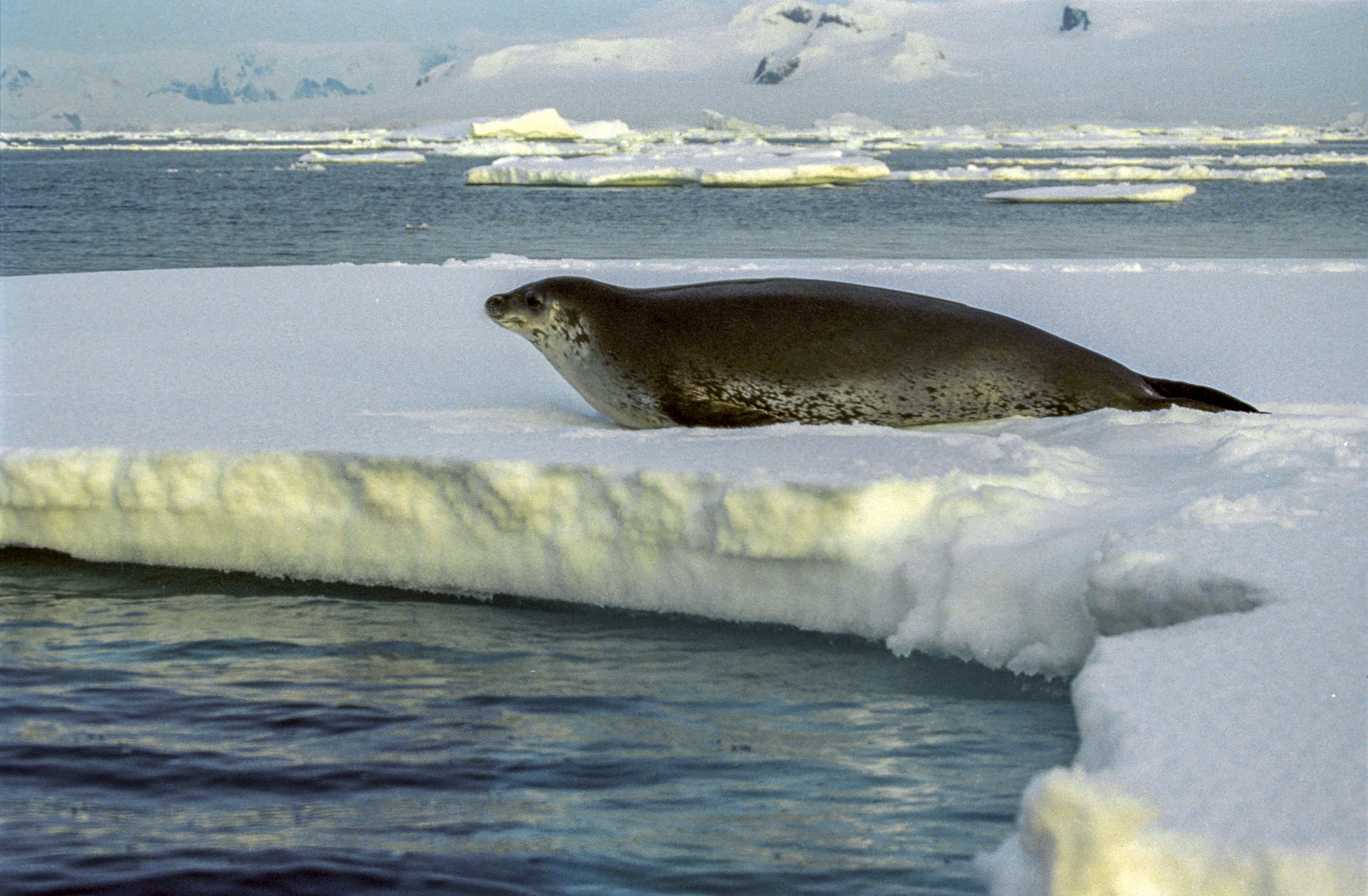 Antarctica, Weddell Seal